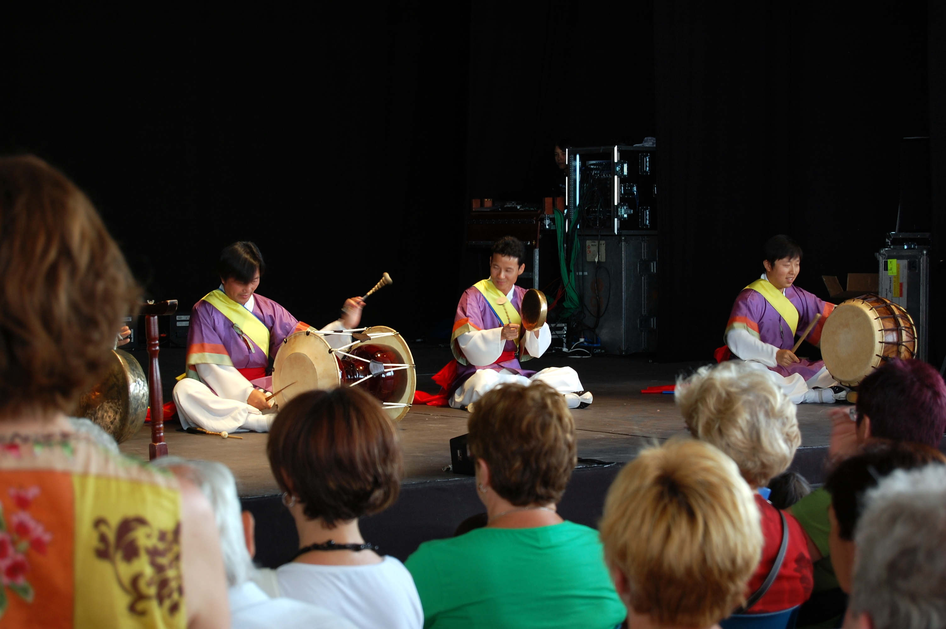 Al principio despacio.